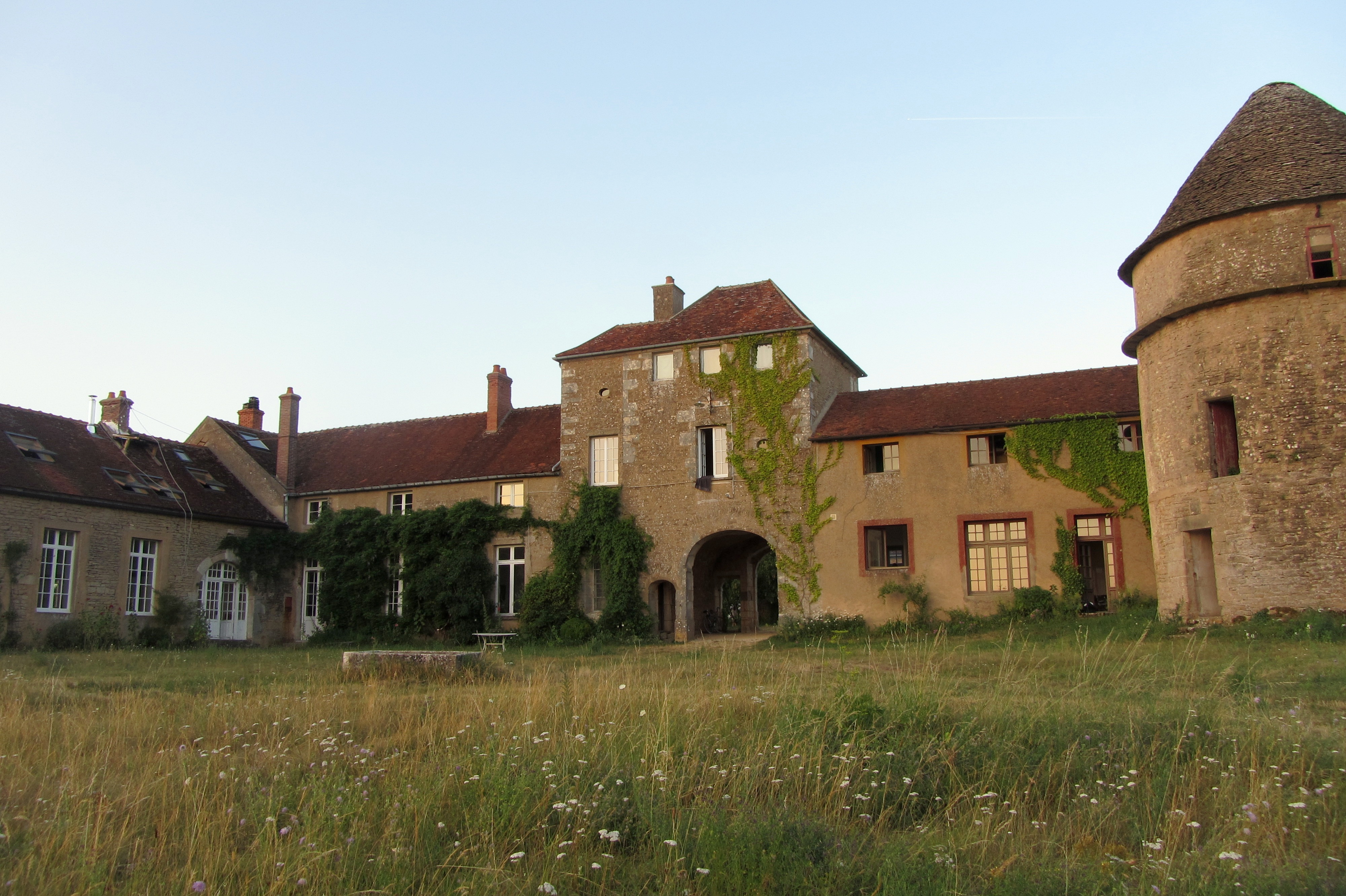 Château de Monthelon (Montréal, Yonne)